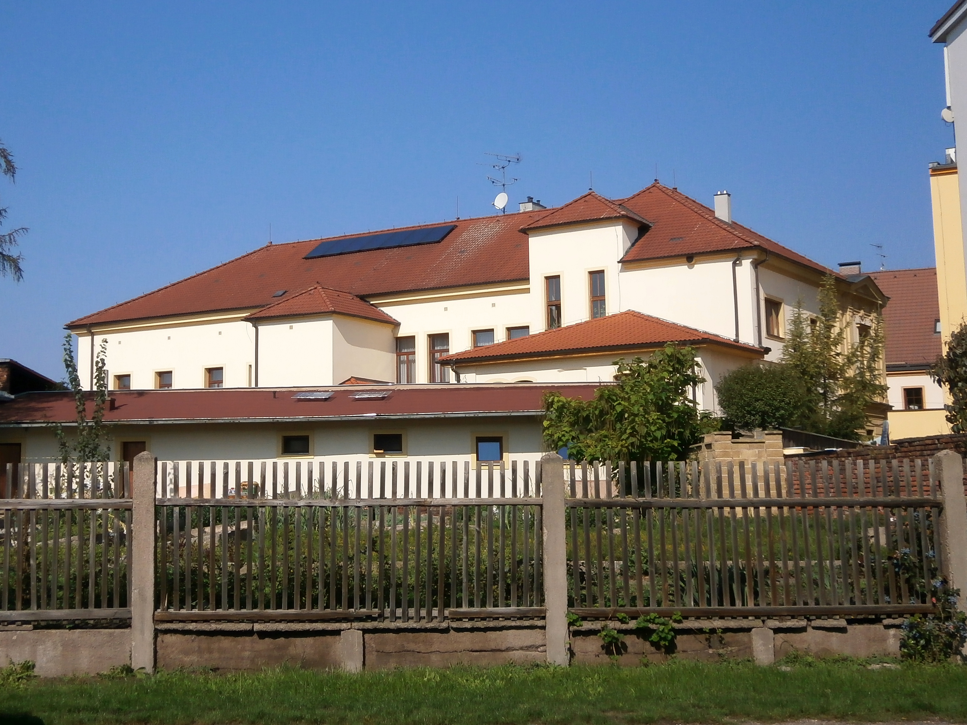 Penzion Černý kůň